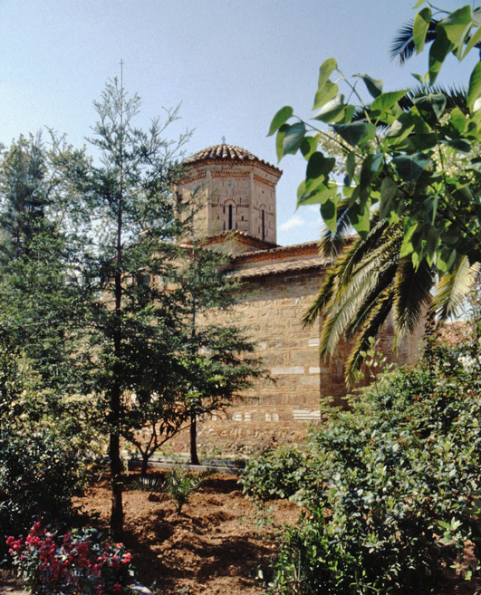 Das Kloster Loukous (Arkadien, Griechenland)